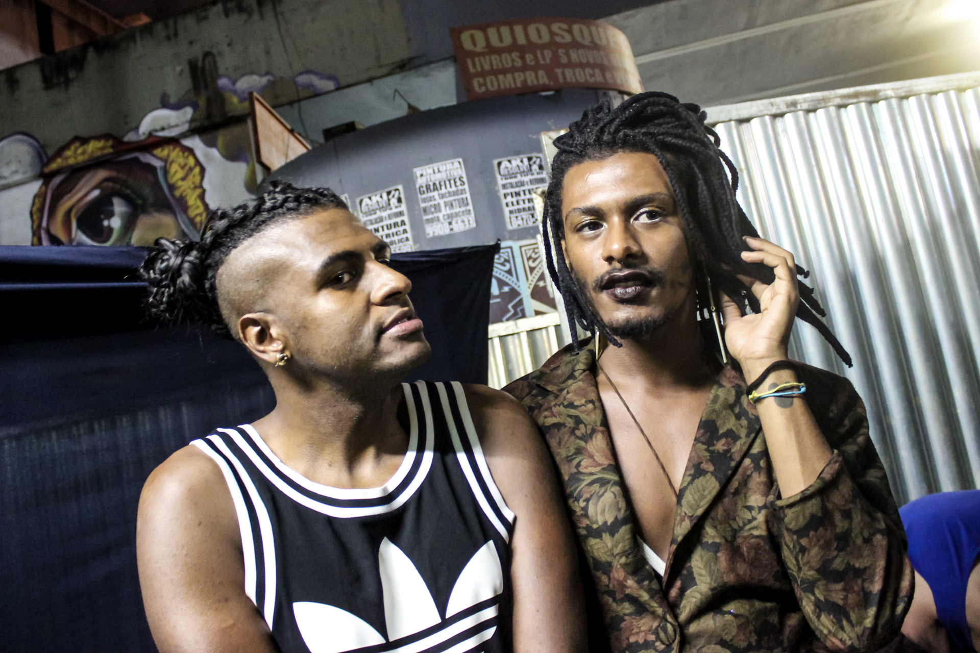 Uma nova festa. Um espaço de diversidade, respeito e muito afeto. Nosso objetivo é criar um lugar de experiências e diversão que repudia todas as atitudes machistas, homofóbicas, racistas e discriminatórias. Venha livre, seja livre! Respeite os corpos, os desejos, os amores. O seu afeto me afeta, então que seja lindo e alegre! No nosso primeiro evento, temos o prazer de trazer duas atrações nacionais de questionamento relevante, para se apresentarem no revitalizado complexo Dulcina. Vai ser muito amor, muito afeto, puro som e sinergia até de manhã.